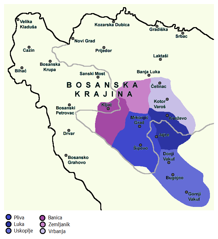 Župe Donjih Kraja